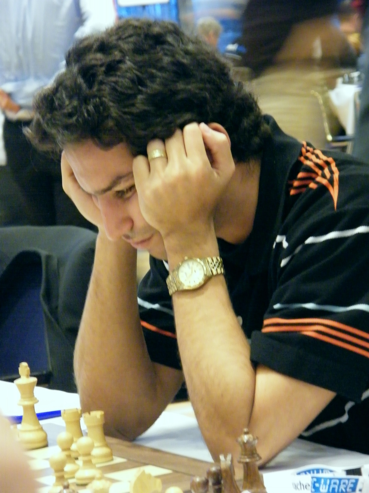 Yuniesky Quezada Perez bei der 38. Schacholympiade in Dresden 2008